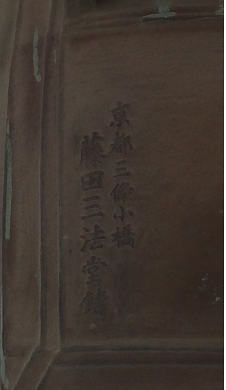 中文（台灣）: 峨崙廟昭和四年銅鐘局部